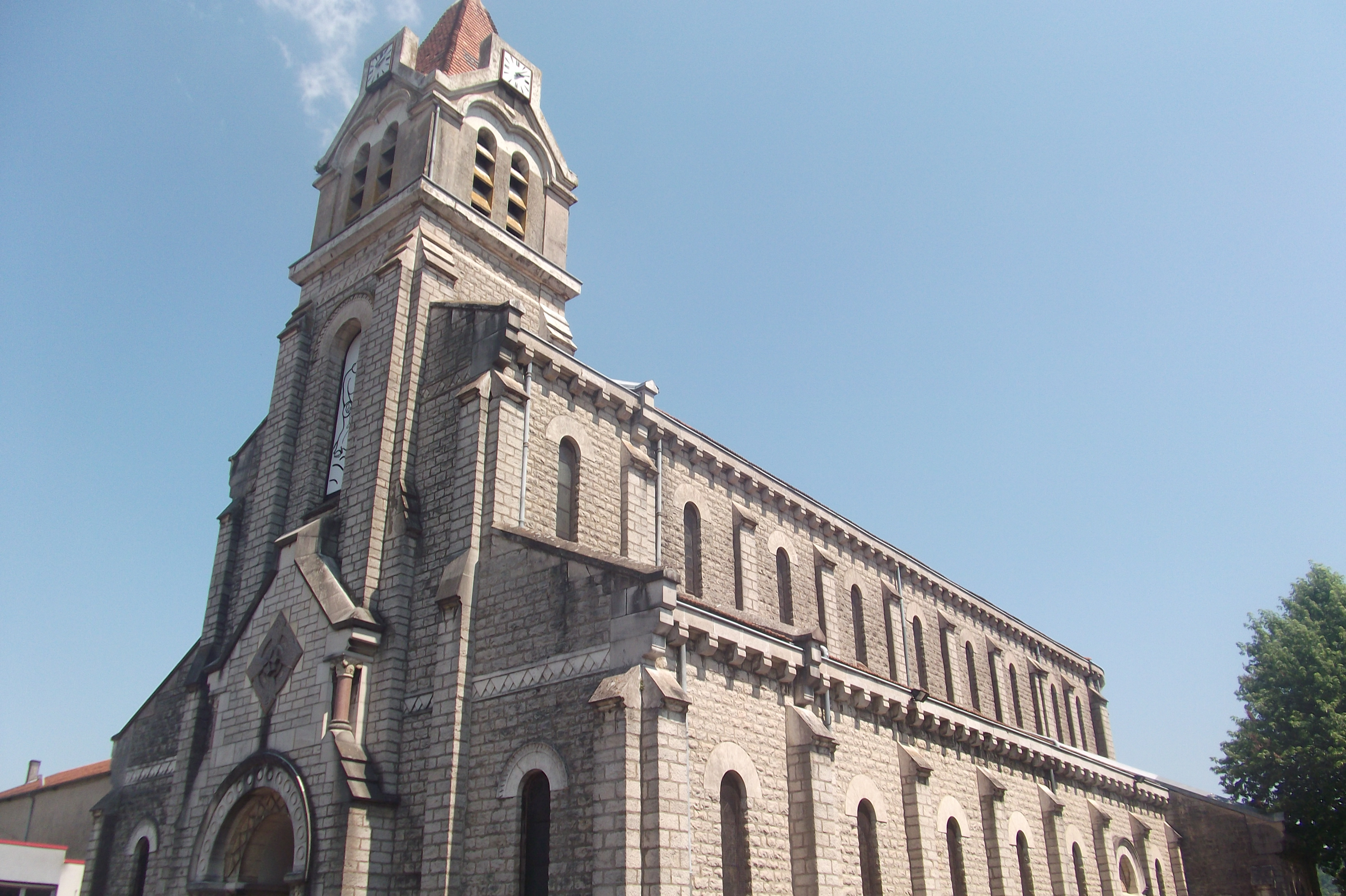 L'église du Sacré-Coeur de Vesoul (Haute-Saône, Franche-Comté)